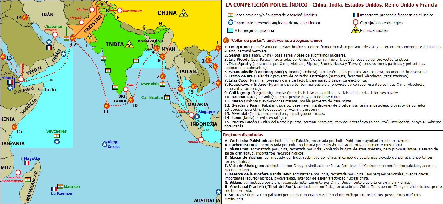 Mapa geopolítico del "collar de perlas" chino.